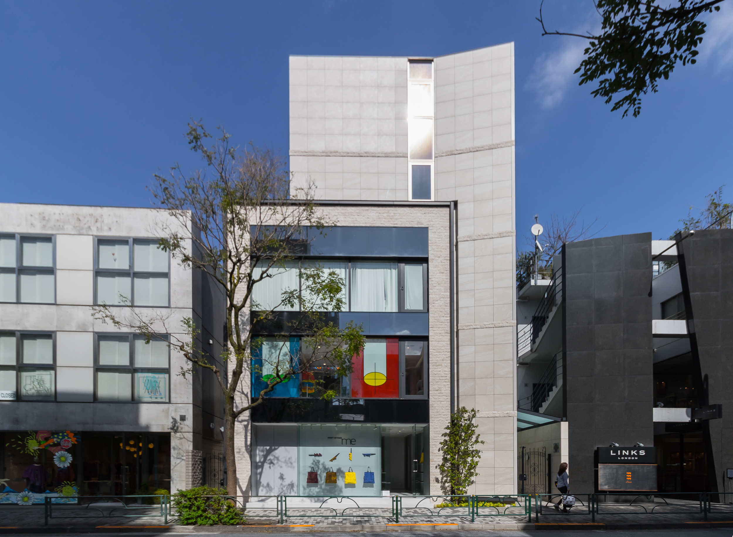 イッセイミヤケ青山店。